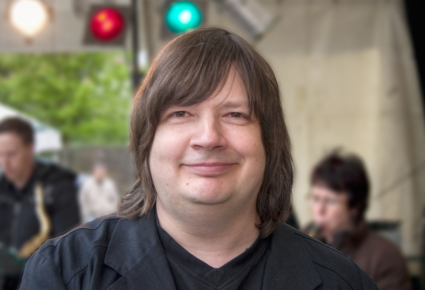 Dirk Raufeisen, Jazzpianist aus Büdingen-Vonhausen